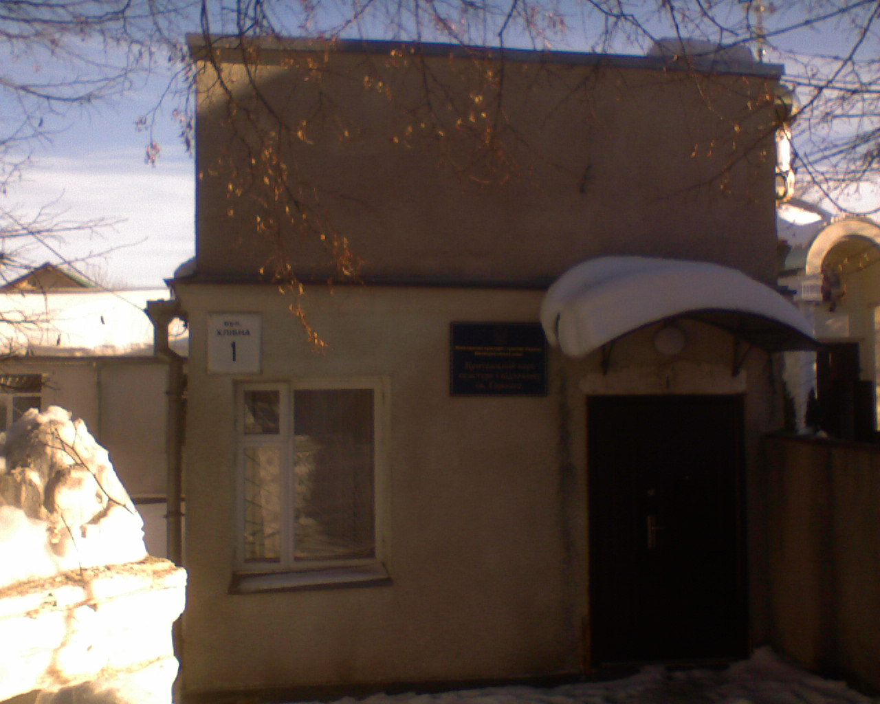 Центральний парк у Вінниці